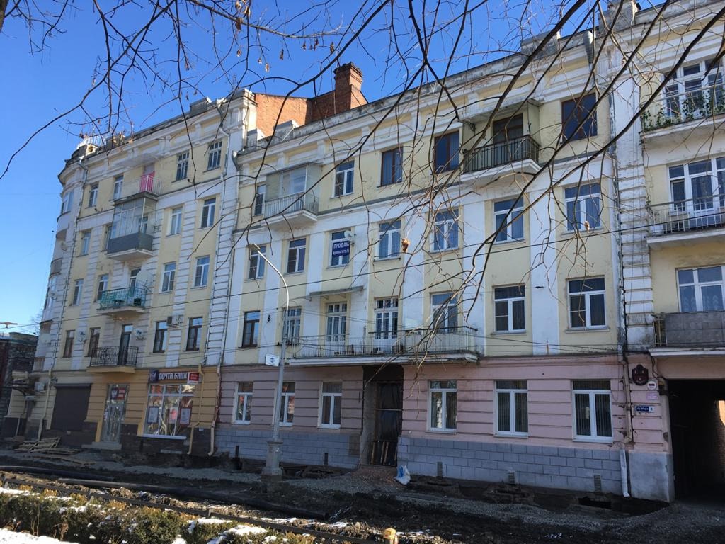 Проспект Мира д. 8, Владикавказ